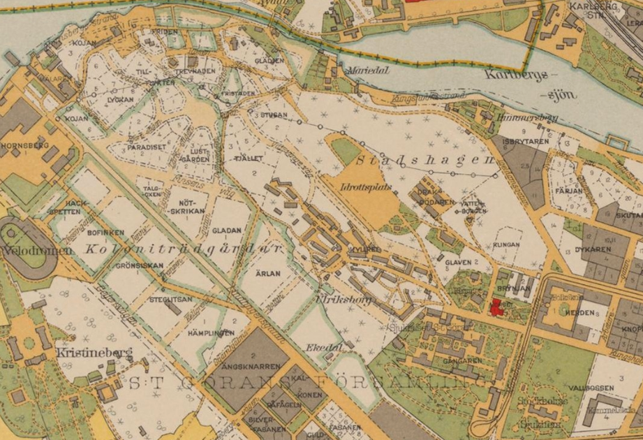 Stadshagens Idrottsplats på en karta från 1930-talet